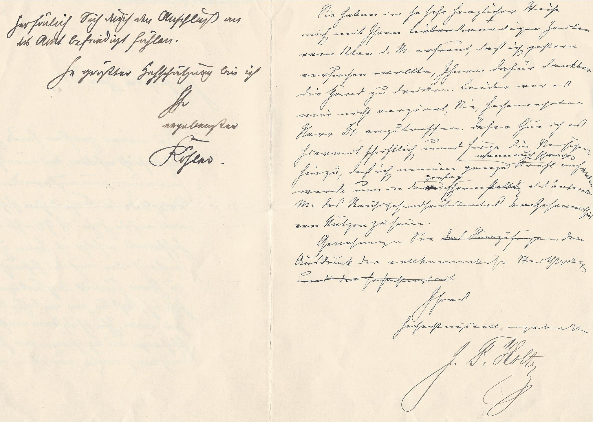 Entwurf eines Dankschreibens von Julius Friedrich Holtz (1836)-1911) an den Direktor des Kaiserlichen Gesundheitamtes Karl Köhler (1847-1912) für die Berufung als ausserordentliches Mitglied des Kaiserlichen Gesundheitsamtes in der Periode von 1892-1896 auf dem Schreiben Köhlers vom 12. Februar 1892.